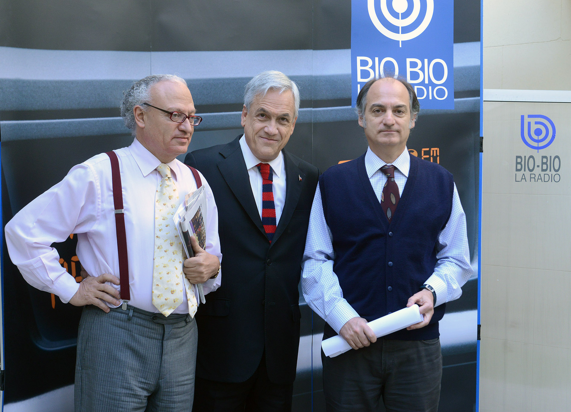 08-05-2013 Entrevista en Radio Bío Bío